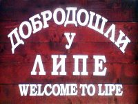 Vítejte v Lipe